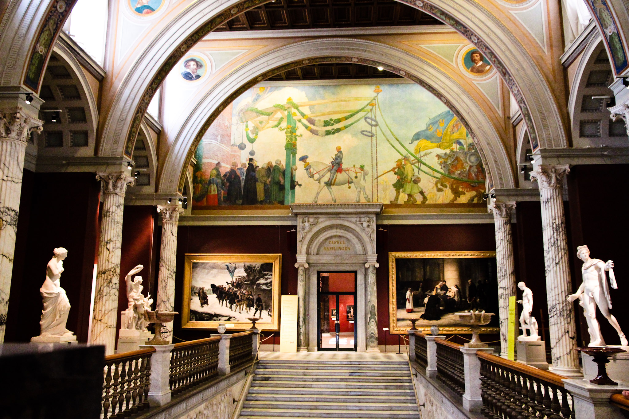 Gustav Vasas intåg i Stockholm 1523 by Carl Larsson